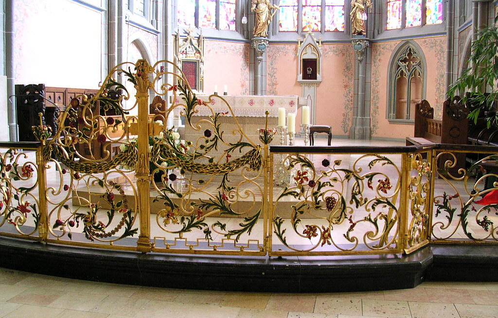 Ahrweiler, katholische Pfarrkirche St. Laurentius, Kommunionbank von 1777–1779 von Urmacher und Bleffert